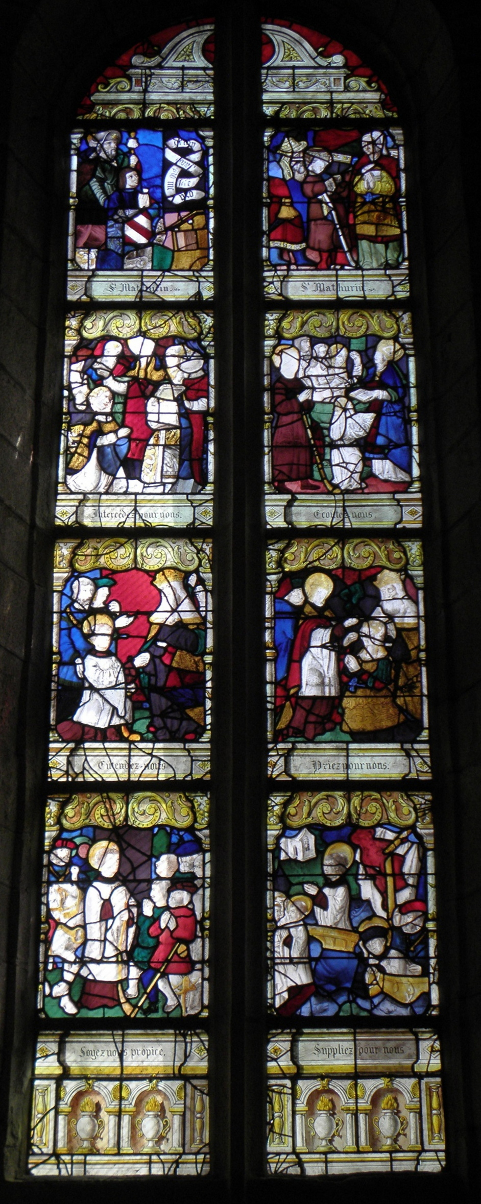 Baie 6 de l'église Saint-Mathurin de Montcontour (22). Vie de Saint-Mathurin.